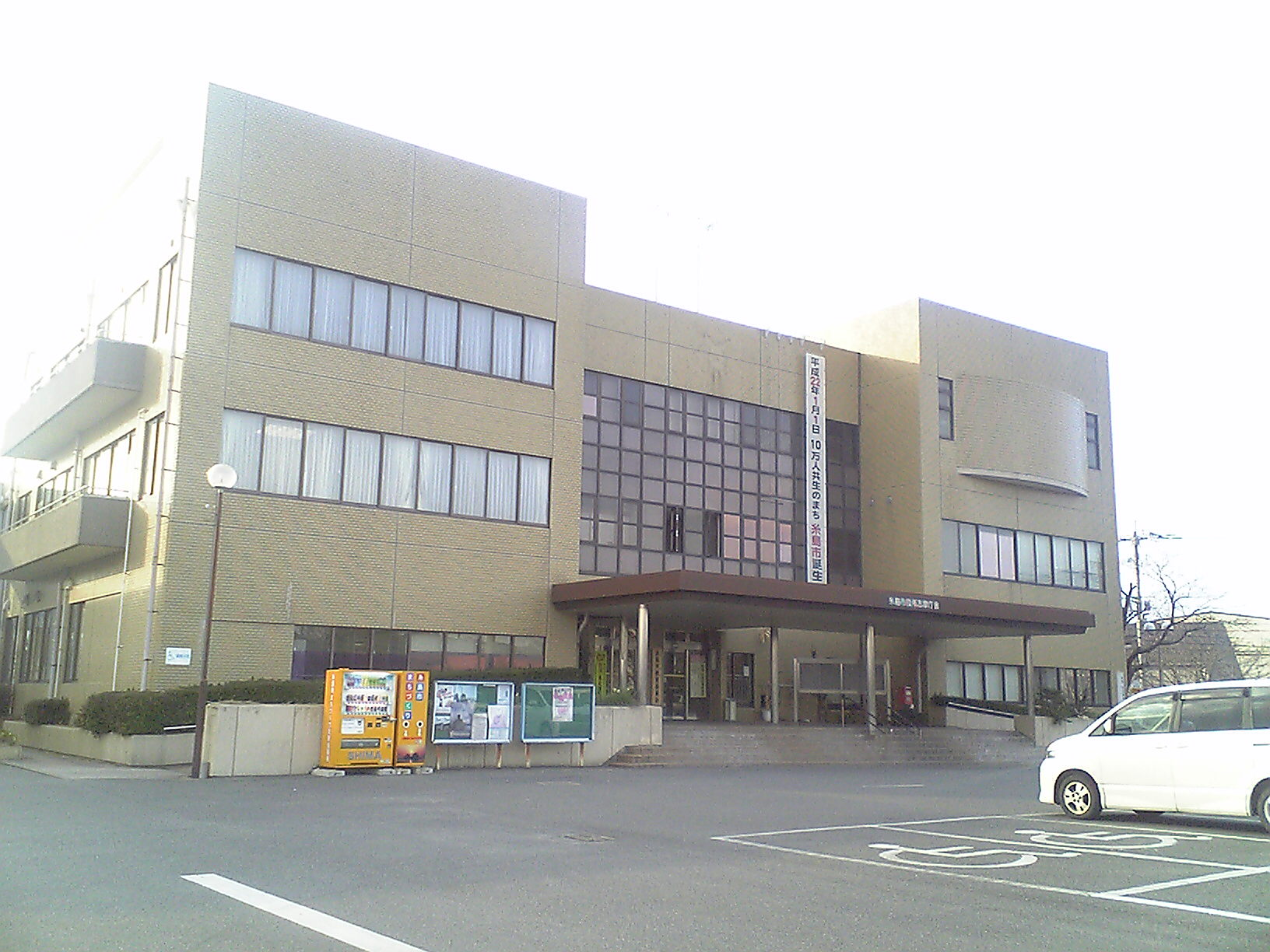 糸島市役所志摩支所 （福岡県糸島市/旧：志摩町役場）